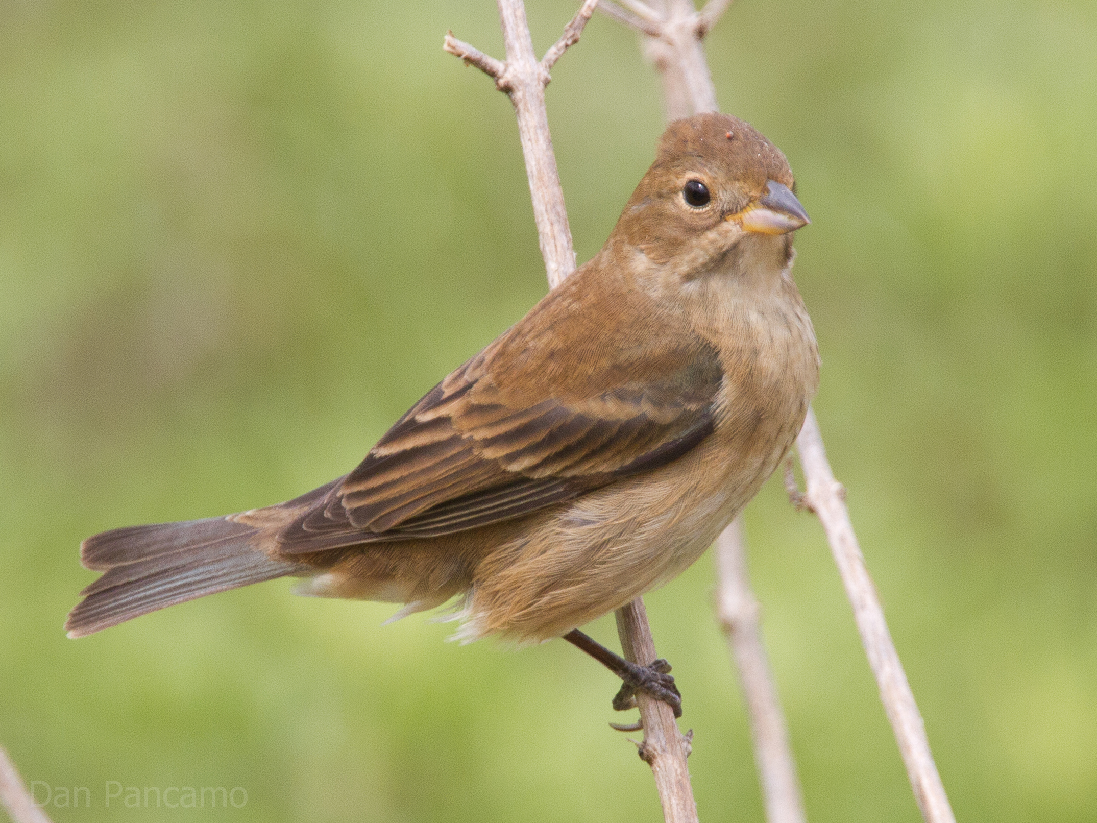 Indigo Bunting Female